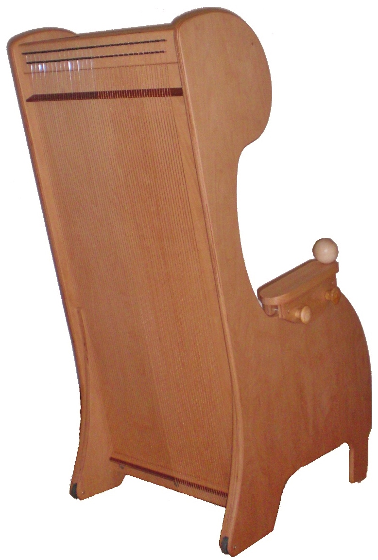 Klangstuhl